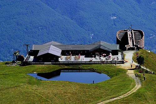 Alpe Foppa mit Santa Maria degli Angeli (Architekt: Mario Botta)